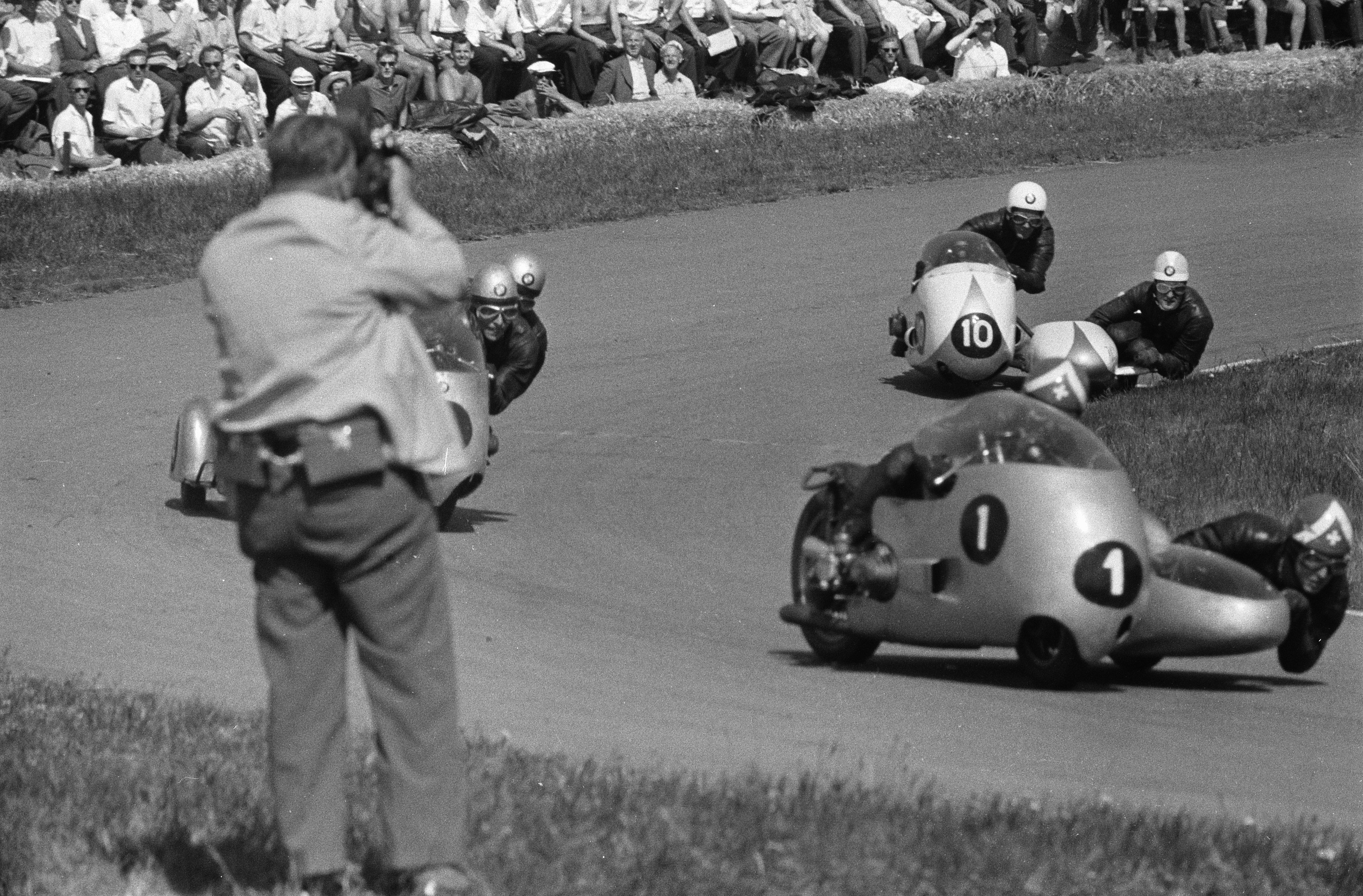 Collectie / Archief : Fotocollectie Anefo Reportage / Serie : TT Assen 1960 Beschrijving : Zijspanrace. (nr. 1 Camathias/Föll) (Fath/Wohlgemut) (nr. 10 Harris/Campbell) Datum : 26 juni 1960 Locatie : Assen Trefwoorden : motorsport Instellingsnaam : TT Fotograaf : Bilsen, Joop van / Anefo Auteursrechthebbende : Nationaal Archief Materiaalsoort : Negatief (zwart/wit) Nummer archiefinventaris : bekijk toegang 2.24.01.05 Bestanddeelnummer : 911-3667